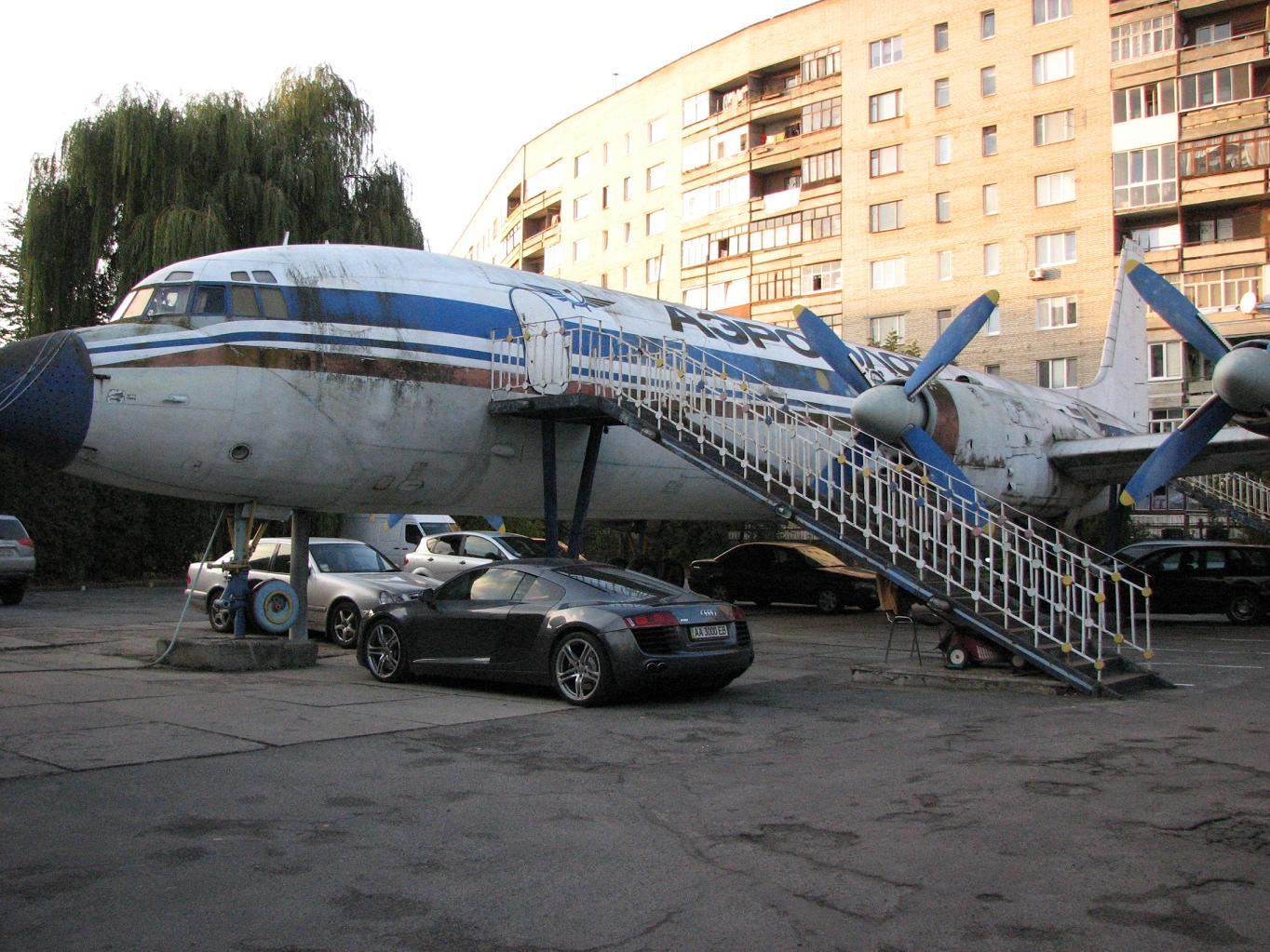 Літак (Луцьк): Літак, що розташований в Луцьку на пр-ті Молоді